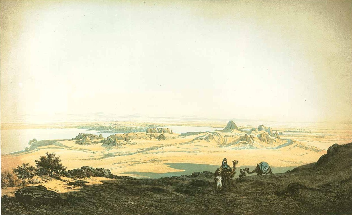 Denkmaeler aus Aegypten und Aethiopien nach den Zeichnungen der von Seiner Majestät dem Koenige von Preussen, Friedrich Wilhelm IV., nach diesen Ländern gesendeten, und in den Jahren 1842–1845 ausgeführten wissenschaftlichen Expedition auf Befehl Seiner Majestät - Ansicht von Semna und Kumma, von Westen